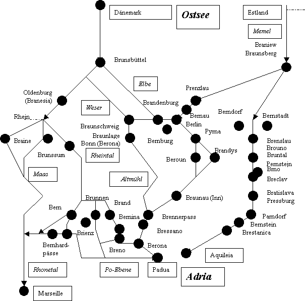 Een barnsteenroute is een handelsweg uit de oudheid, waarlangs het barnsteen van de vindplaatsen aan de Oostzee en Noordzee (Denemarken) naar afnemers in het Middellandse Zeegebied werd getransporteerd. Deze afbeelding werd door de auteur zelf geproduceerd en zonder copyright vrijgegeven. J.W.Richter 4 dec 2004 13:26 (CET)